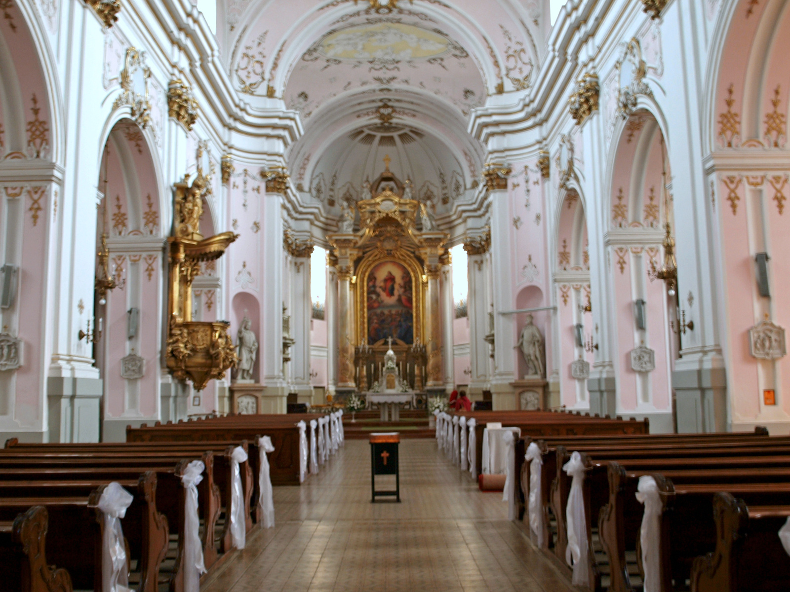 Érseki székesegyház (Kalocsa, Szentháromság tér) This is a photo of a monument in Hungary, Identifier: 2215